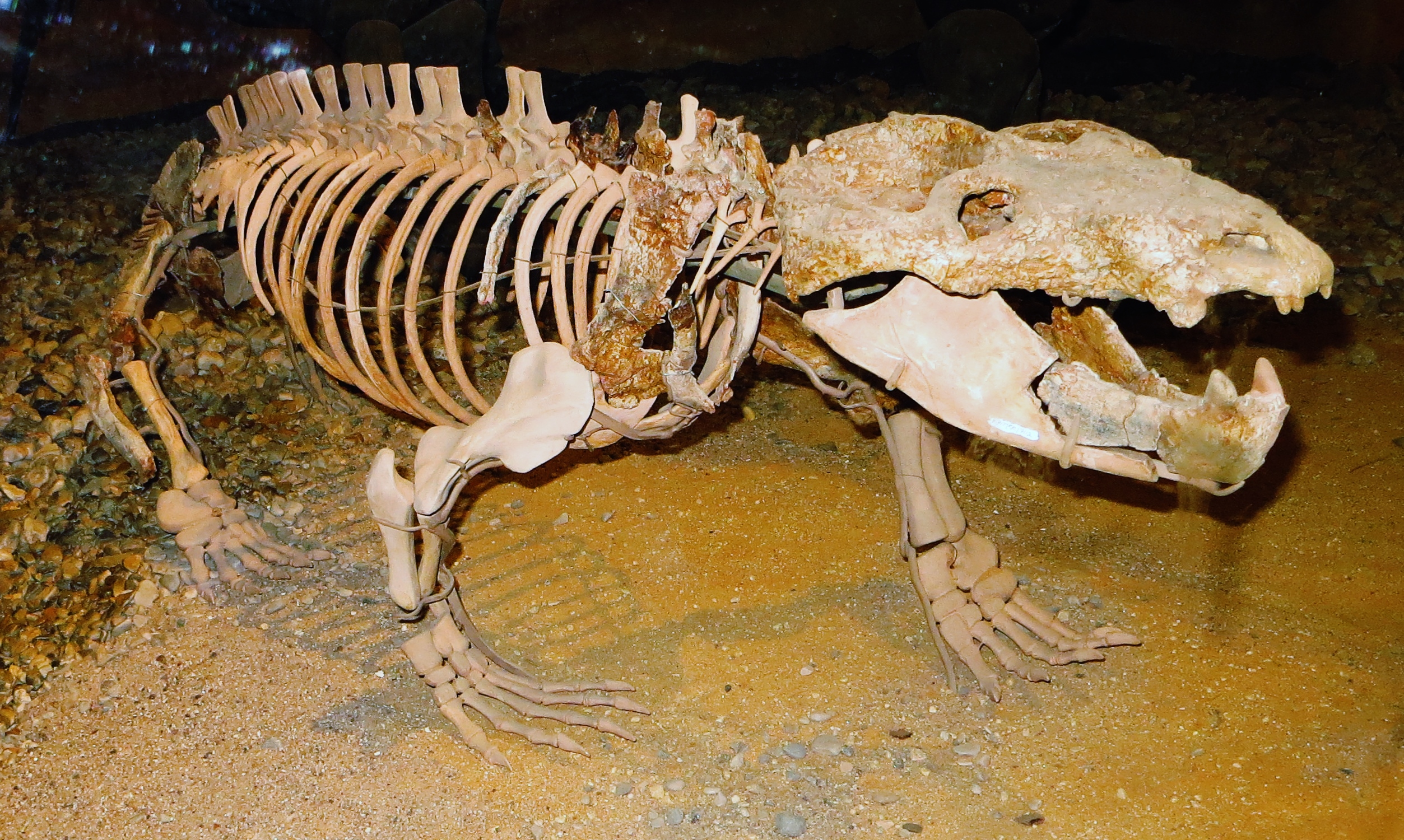 Fossil of Chiniquodon, an extinct therapsid - Took the picture at Museum of Paleontology, Tuebingen